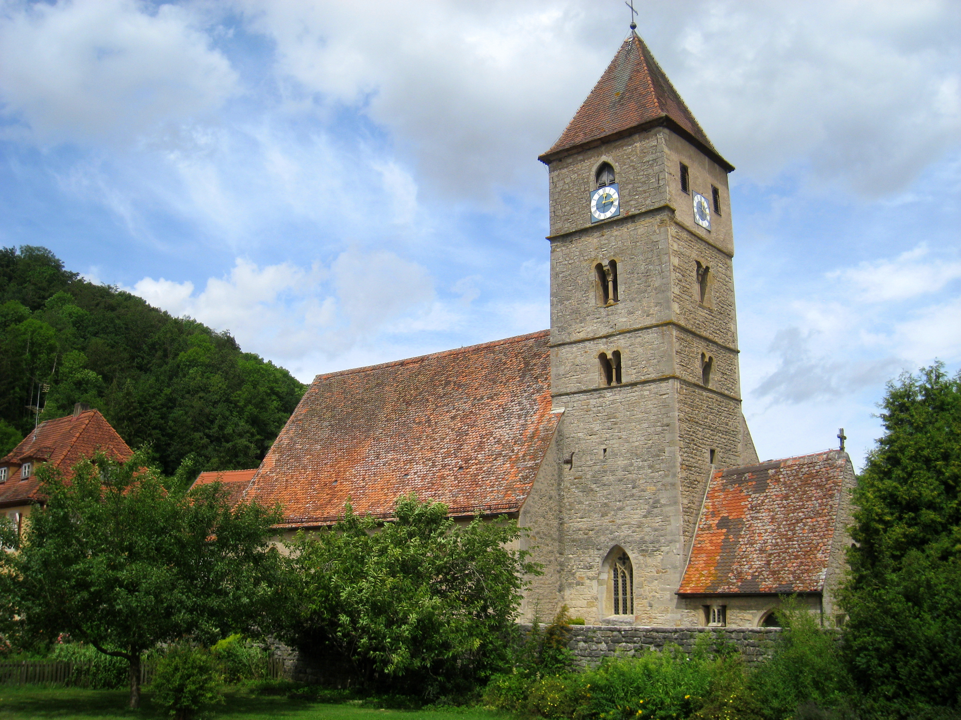 Exterior view - St. Peter und Paul church, Detwang, Rothenburg ob der Tauber, Germany.